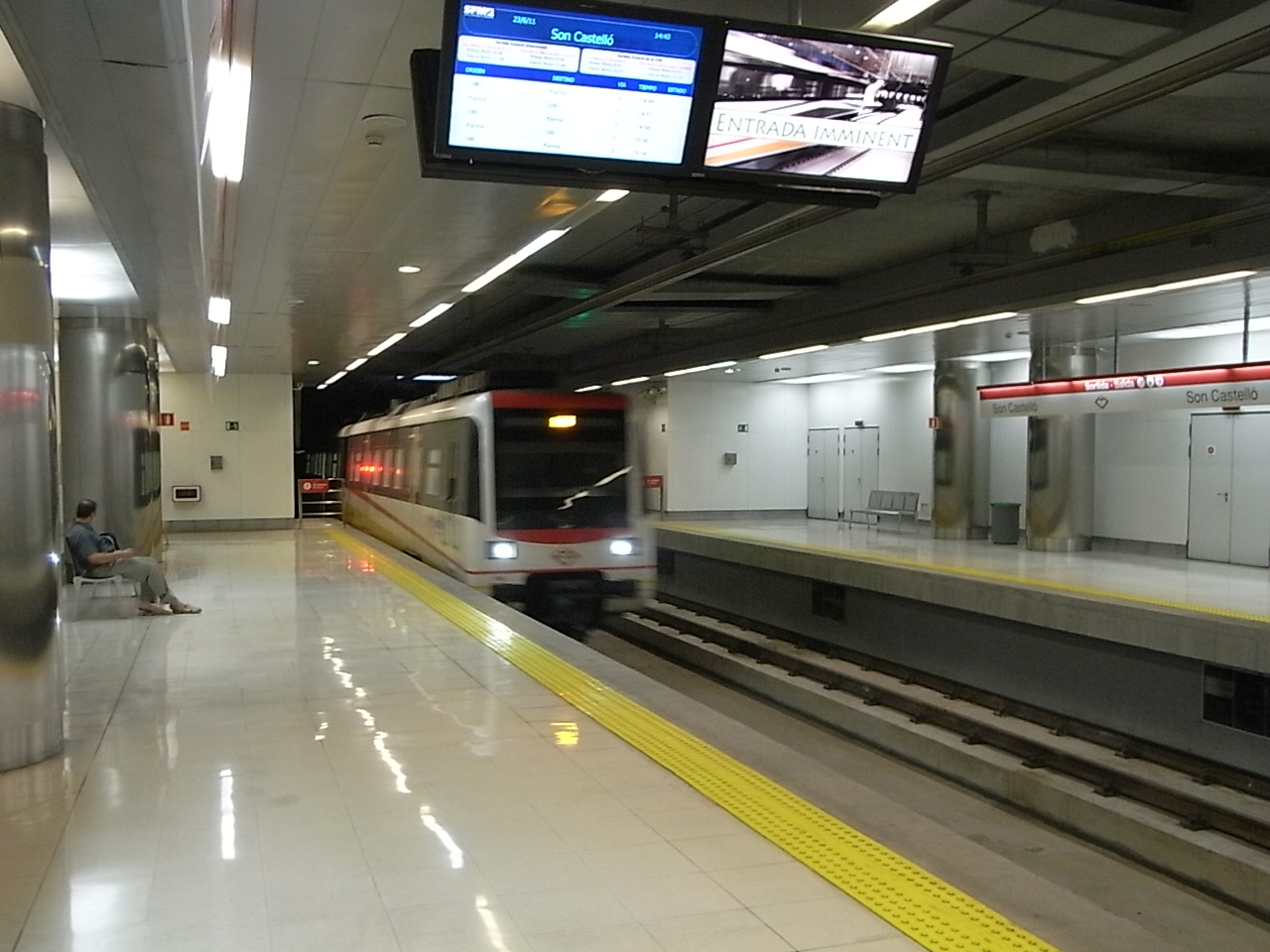 U-Bahnhof Son Castelló in Palma (Mallorca)